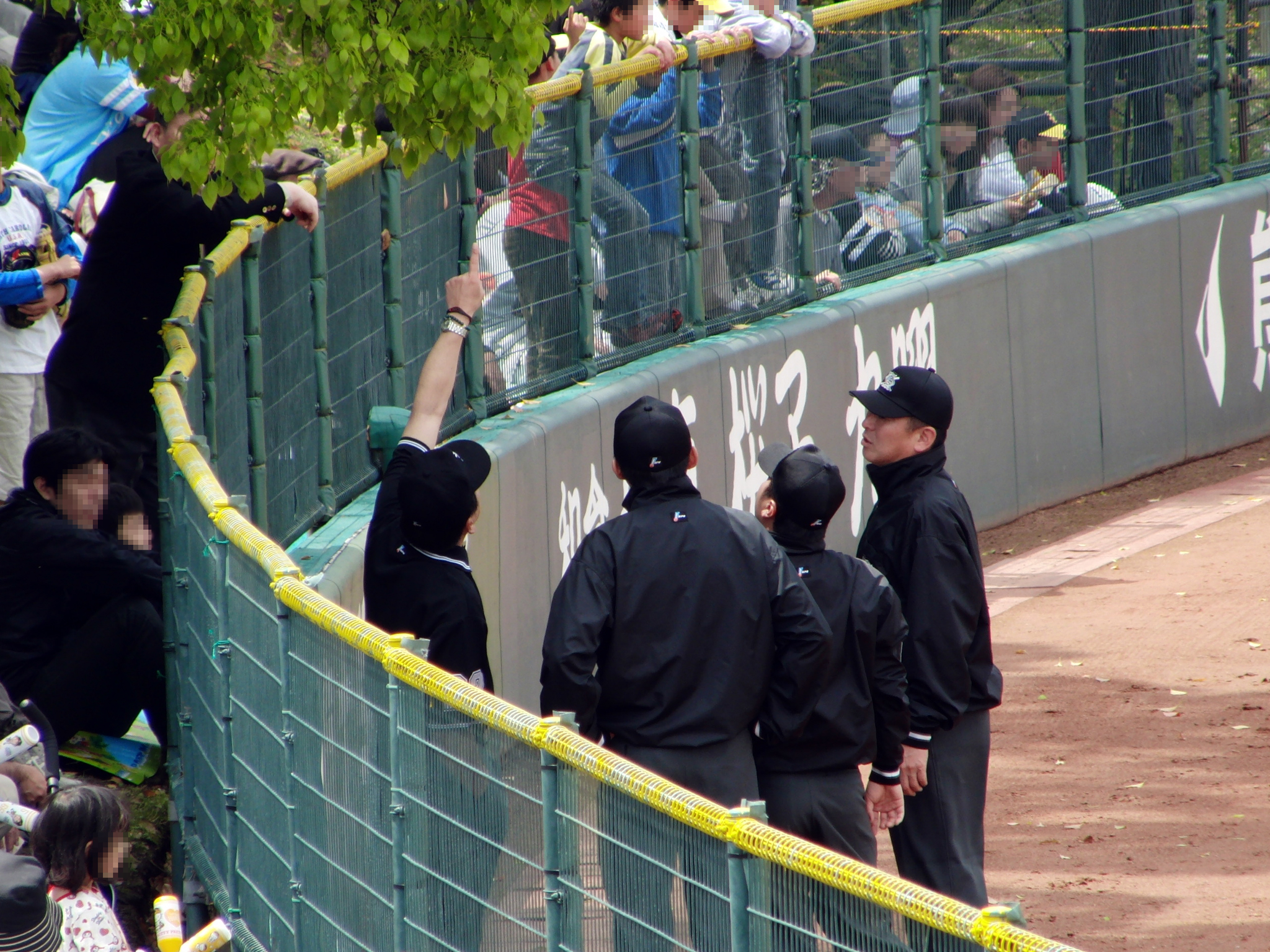 藤崎台県営野球場クスノキを確認している審判団